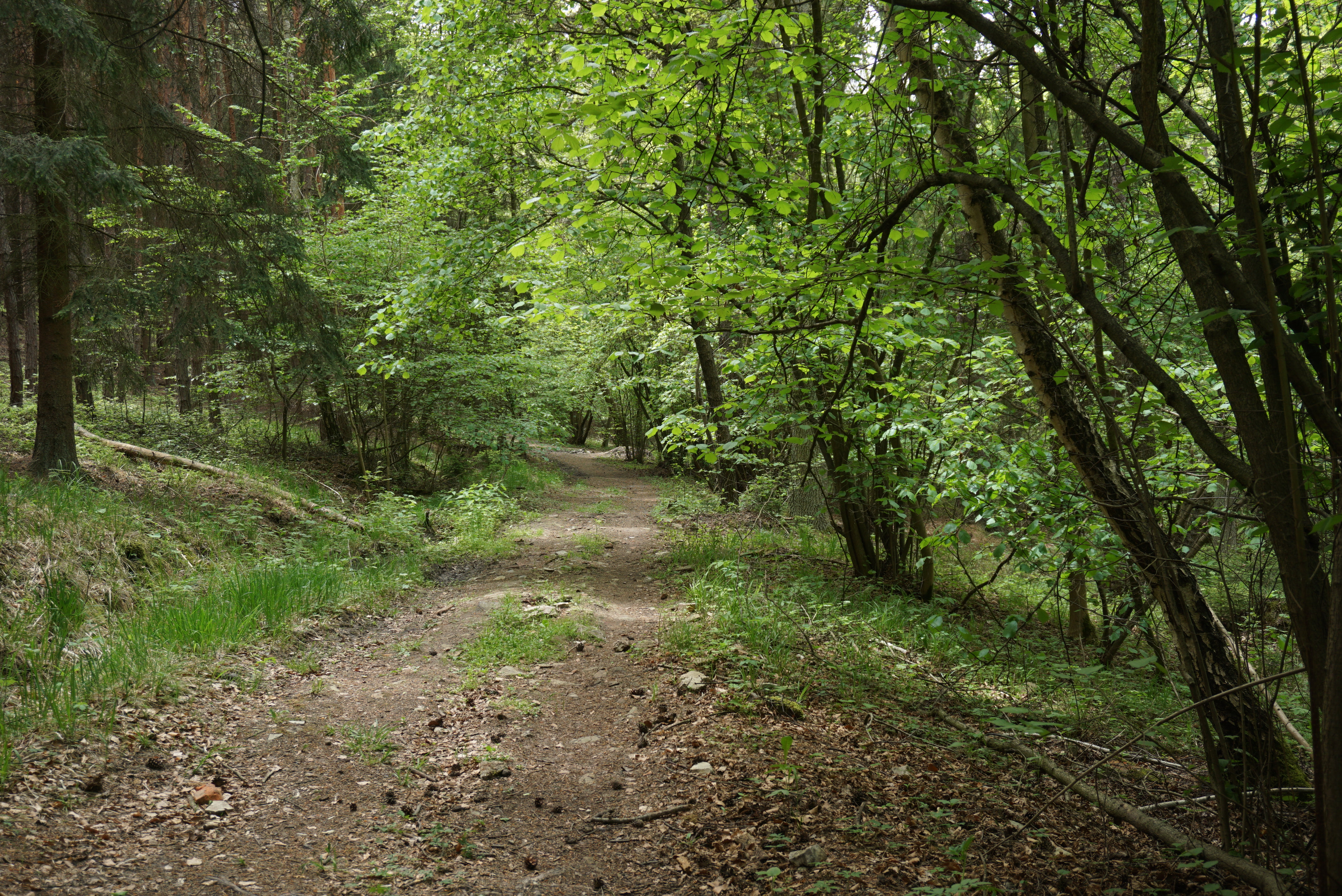 PP Smradovna - údolí Samotínského potoka (Cikánský dolík)